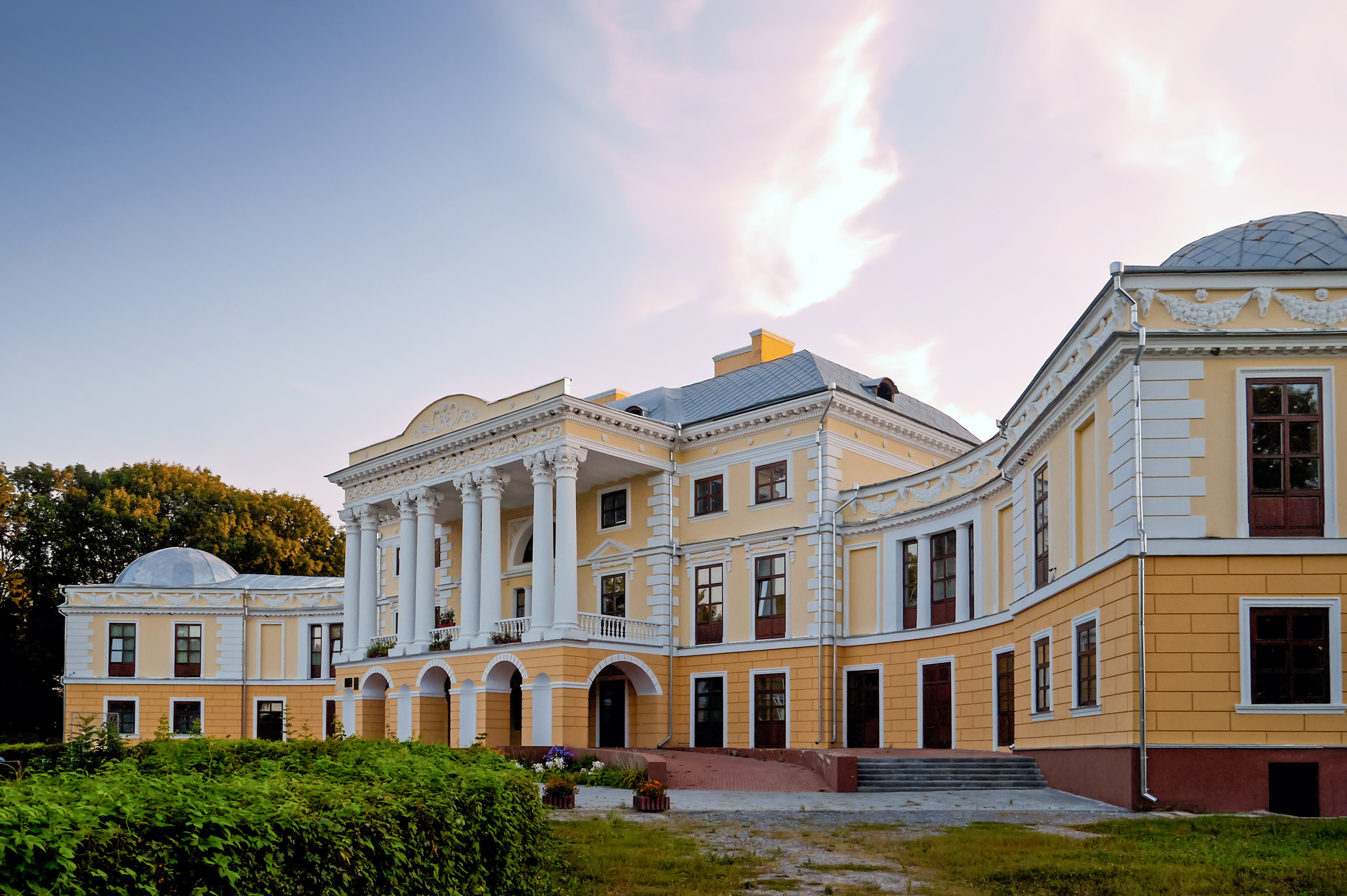 Палац, Вороновиця, вул. Козацький шлях, 26 (колишня Леніна)